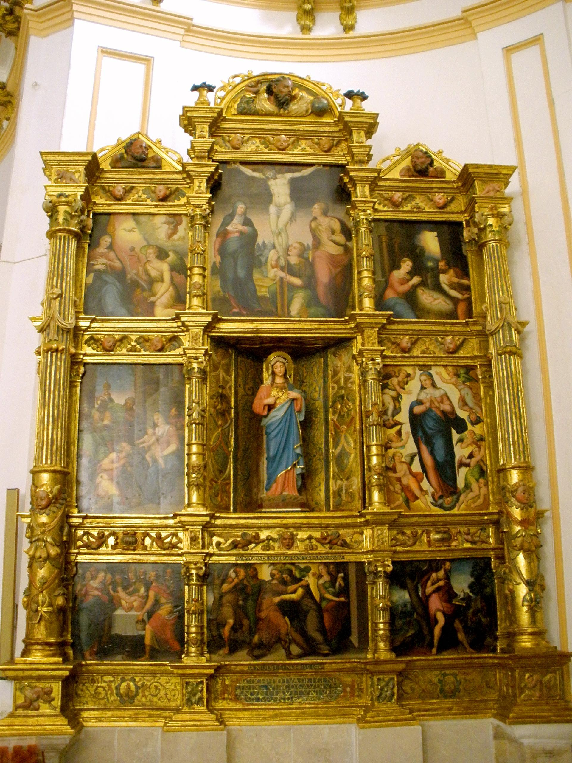 Retablo renacentista de Santa Ana, en la iglesia del Convento de la Concepción de Cuéllar (provincia de Segovia, Castilla y León, España).